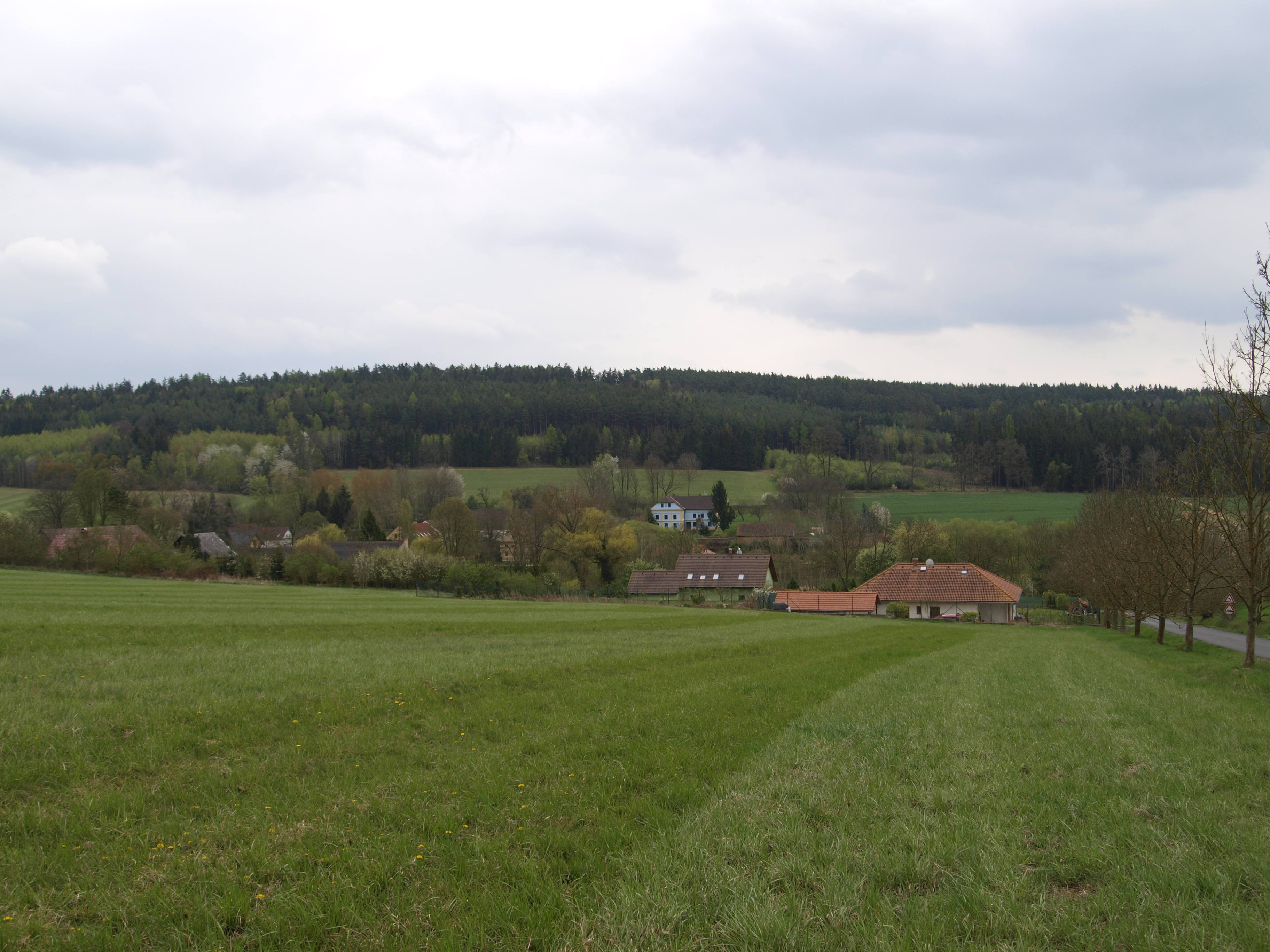 celkový pohled na Bozdíš ze silnice 19361 vedoucí z obce Březí Project: Fotíme Česko.